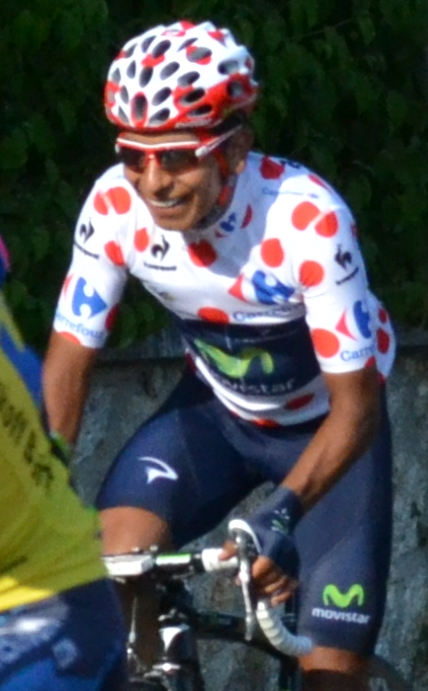 Nairo Quintana durant la dernière étape du Tour